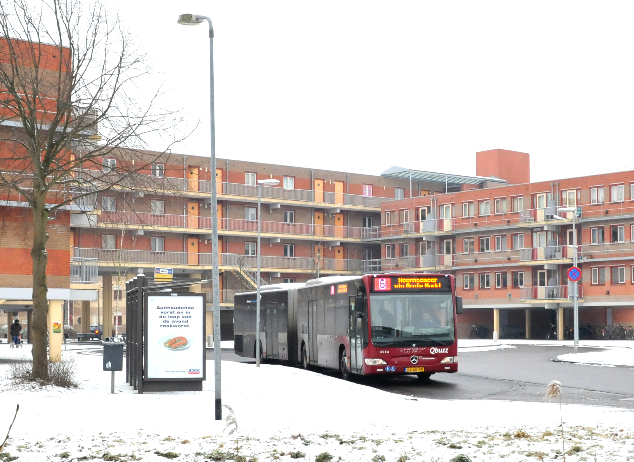 Qbuzz bus 3066 van het type Mercedes O530 Citaro G als lijn 6 te Beijum.